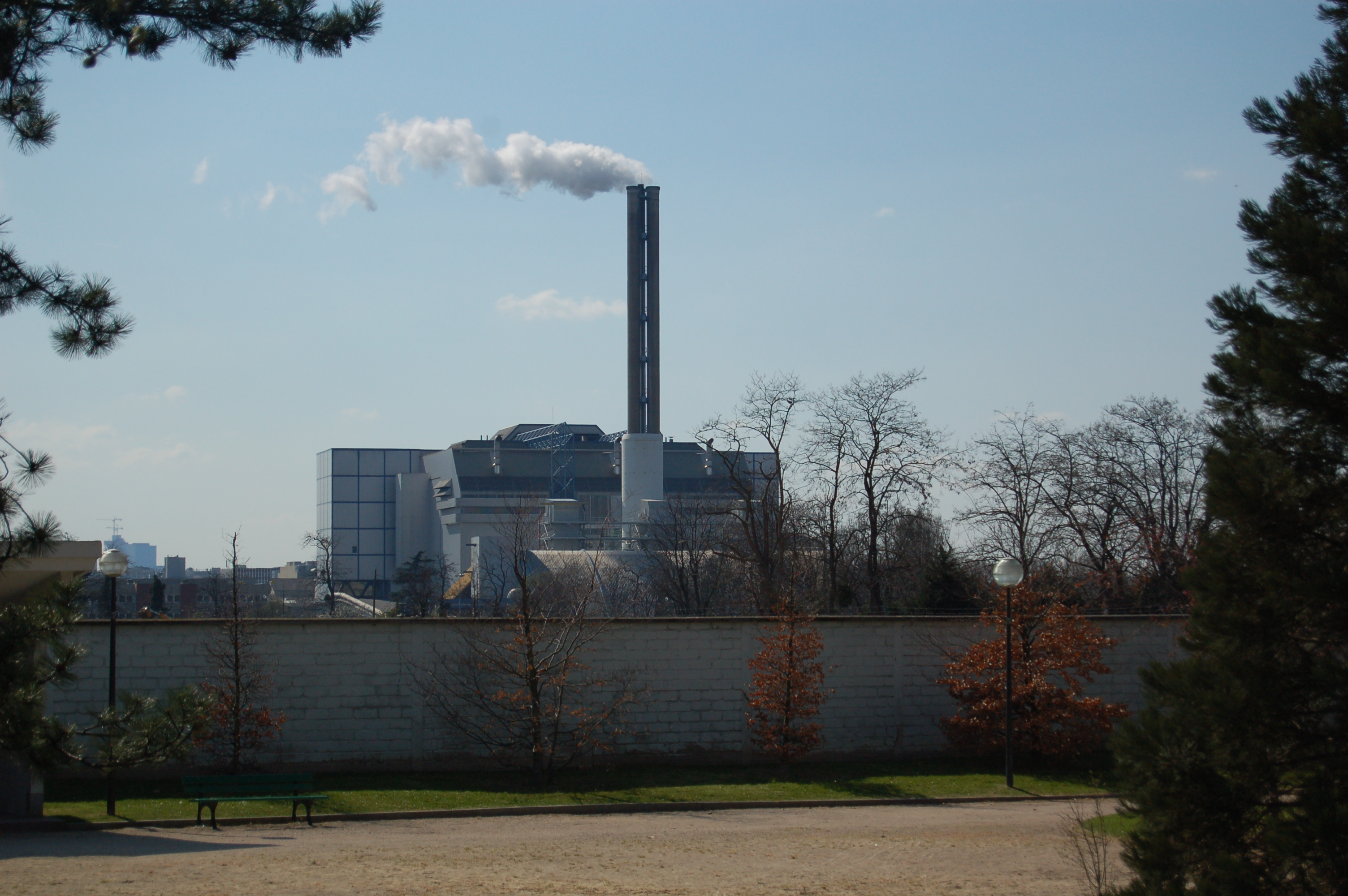 Incinérateur de déchets de Saint Ouen (Seine Saint Denis).